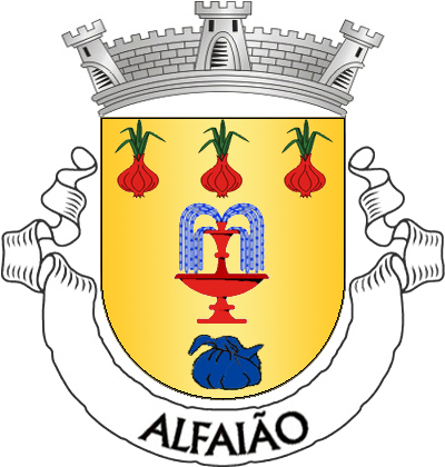 Brasão da Aldeia